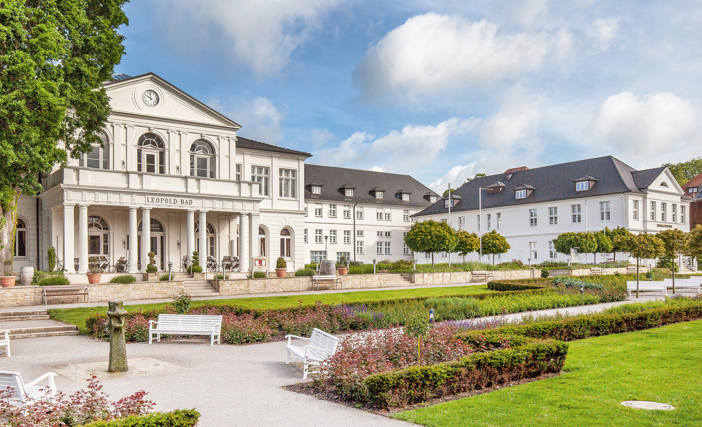 Leopold-Bad und Inhalatorium in Bad Salzuflen, Kreis Lippe, Nordrhein-Westfalen. This is a photograph of an architectural monument. /107